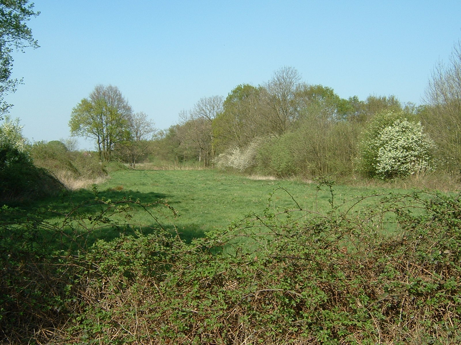 Eigen foto